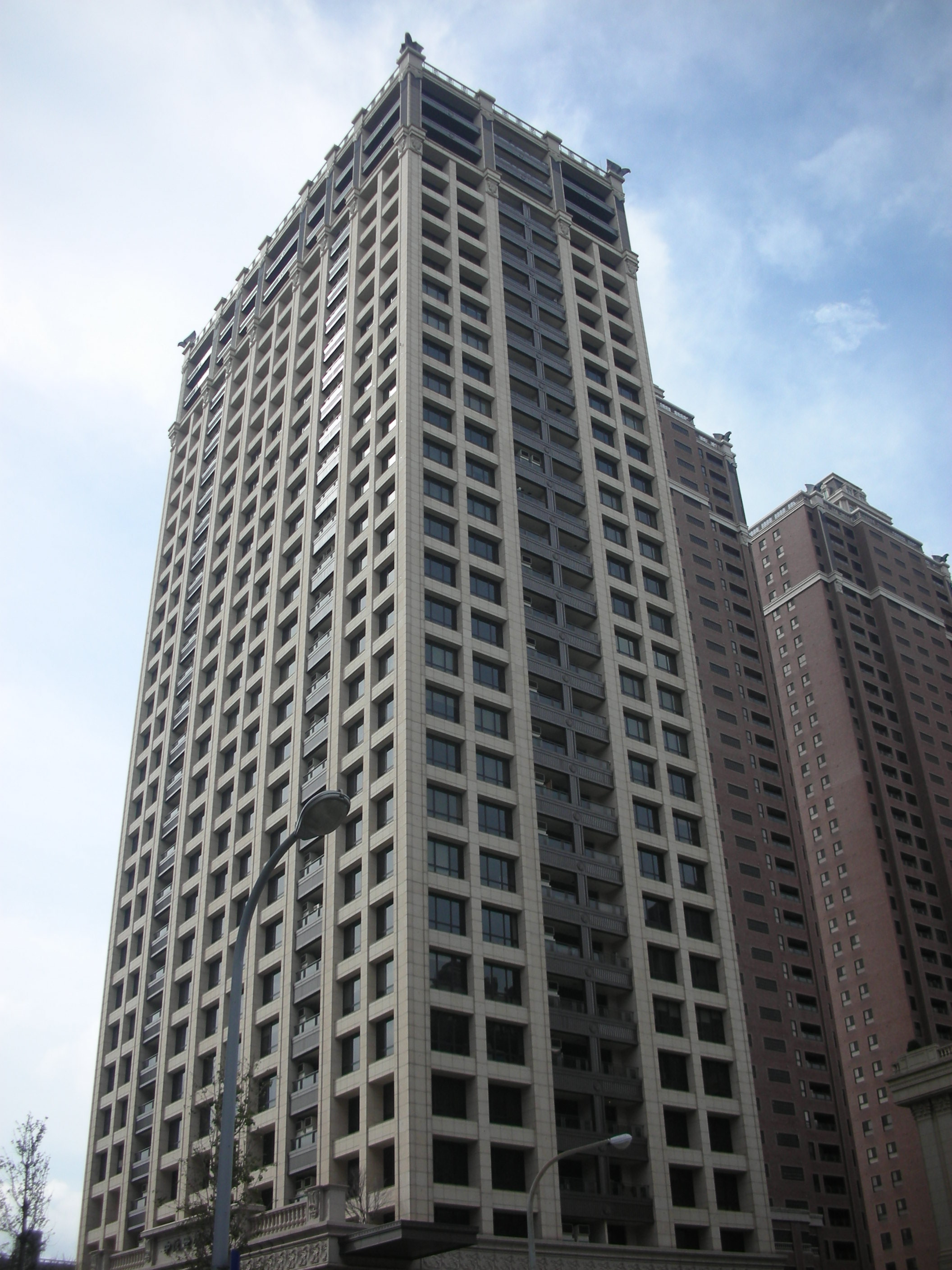 中悅世界中心是位於臺灣桃園市桃園區的高層建築，坐落於桃園藝文特區中正路、同德五街口，高32層，150.1公尺。